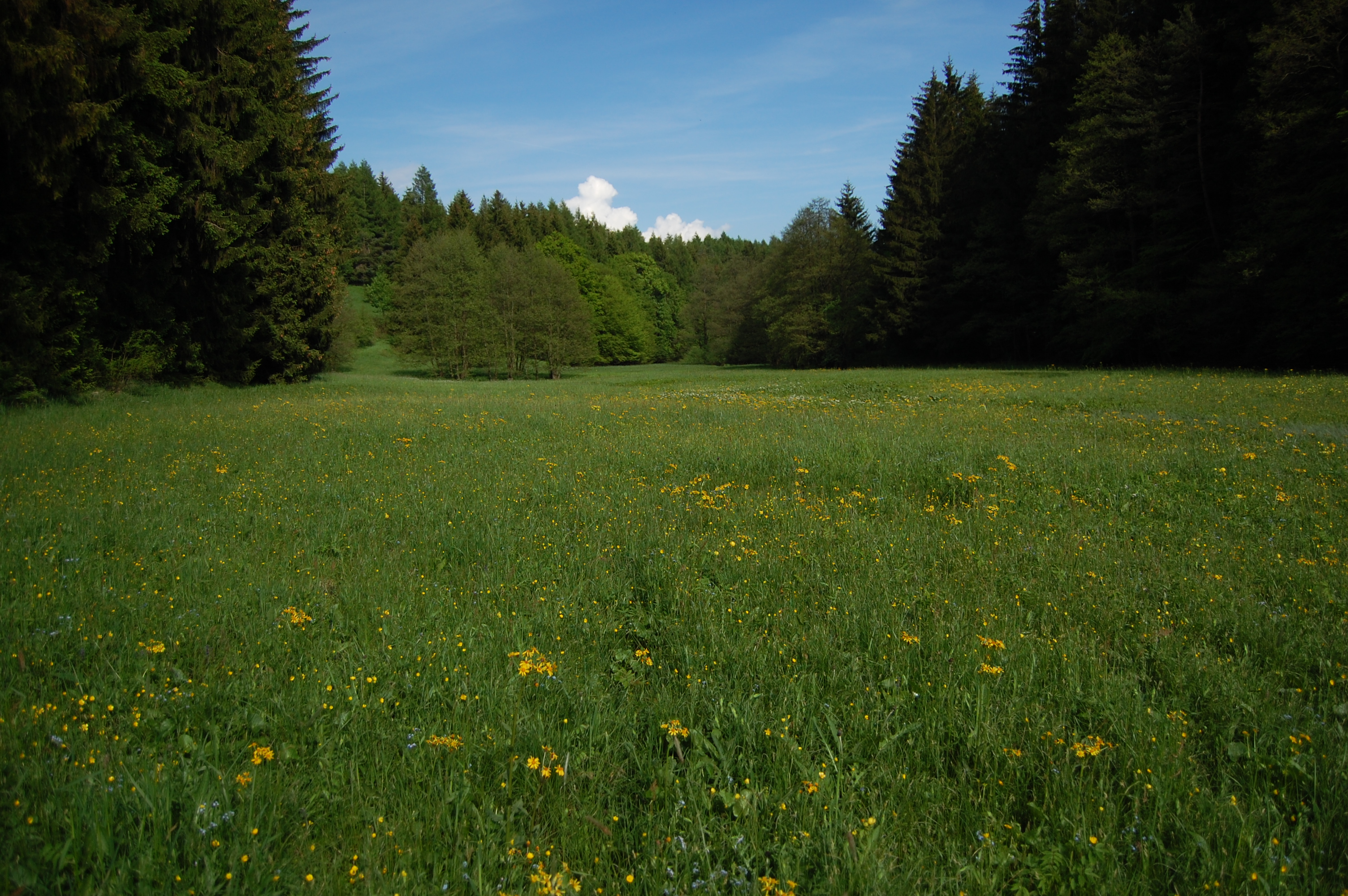 Přírodní rezervace Lipovské úpolínové louky - foto 4, Lipová, okres Prostějov